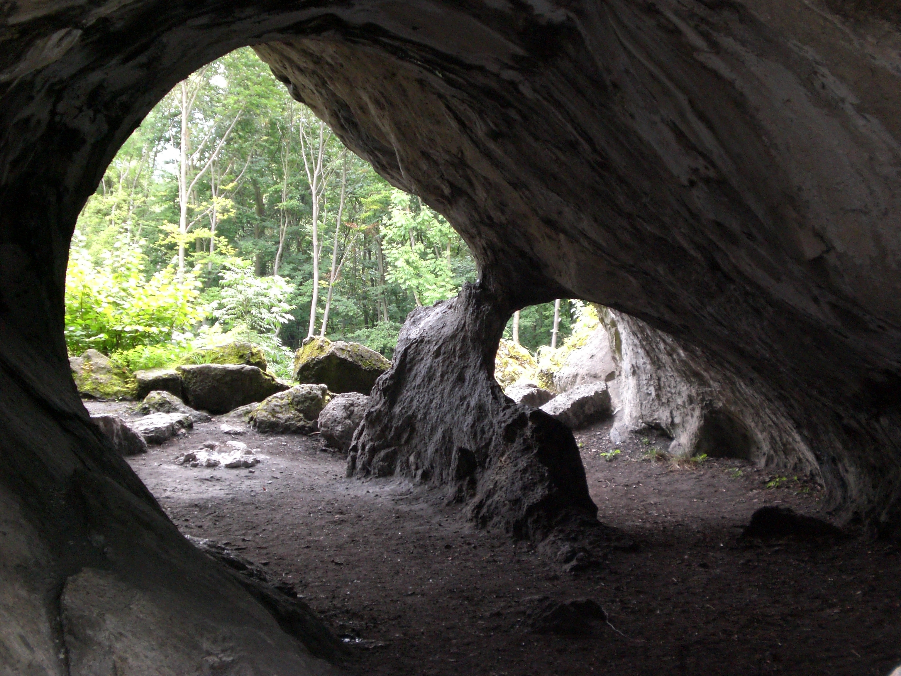 Quackenschloß bei Engelhardsberg (C4)